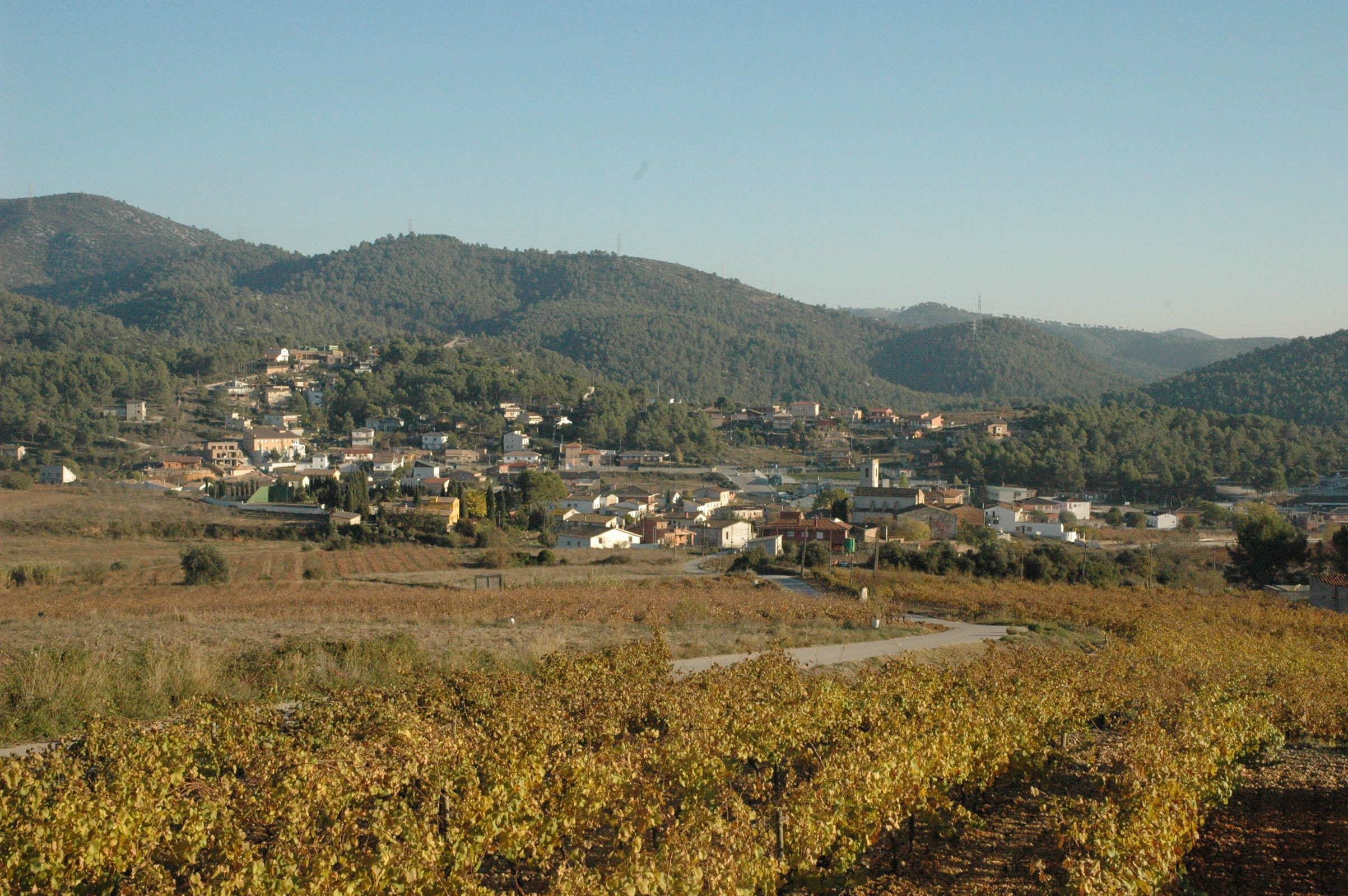 Olesa de Bonesvalls, Alt Penedès